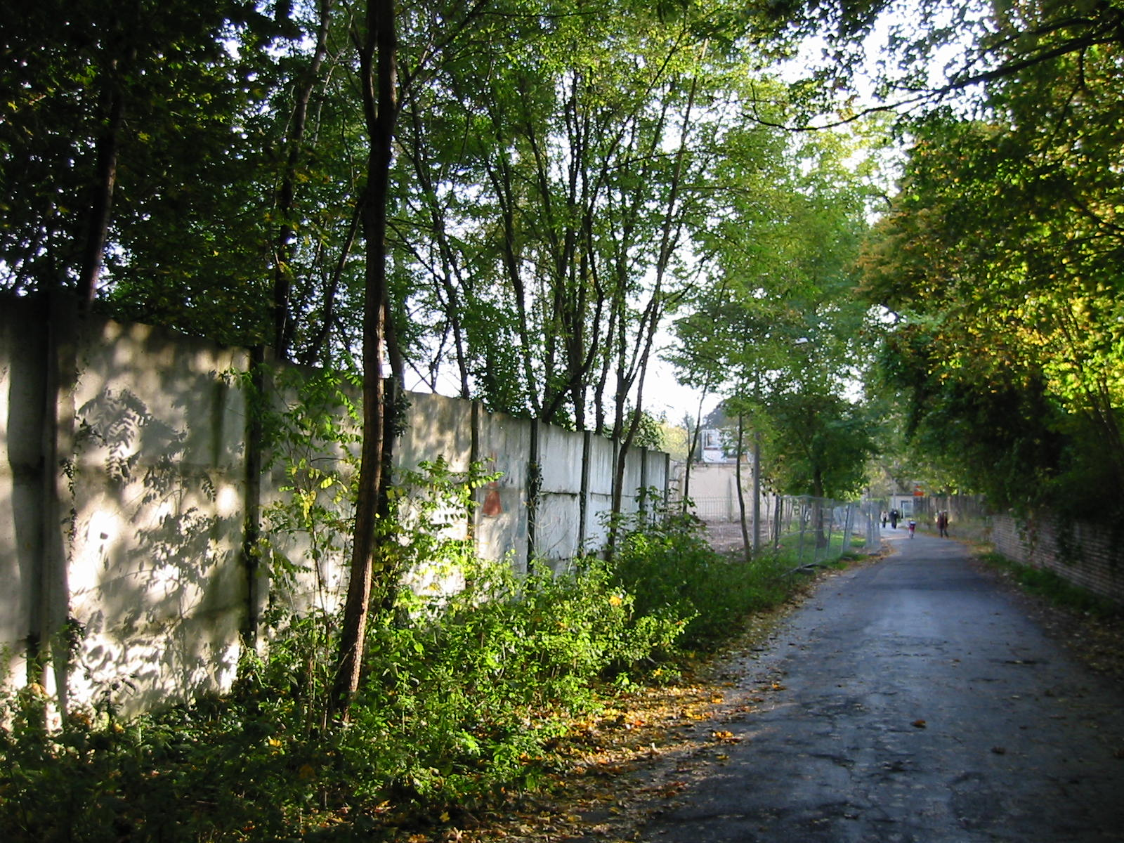 "Hinterlandmauer", Potsdam, Bertinistrasse, 2005